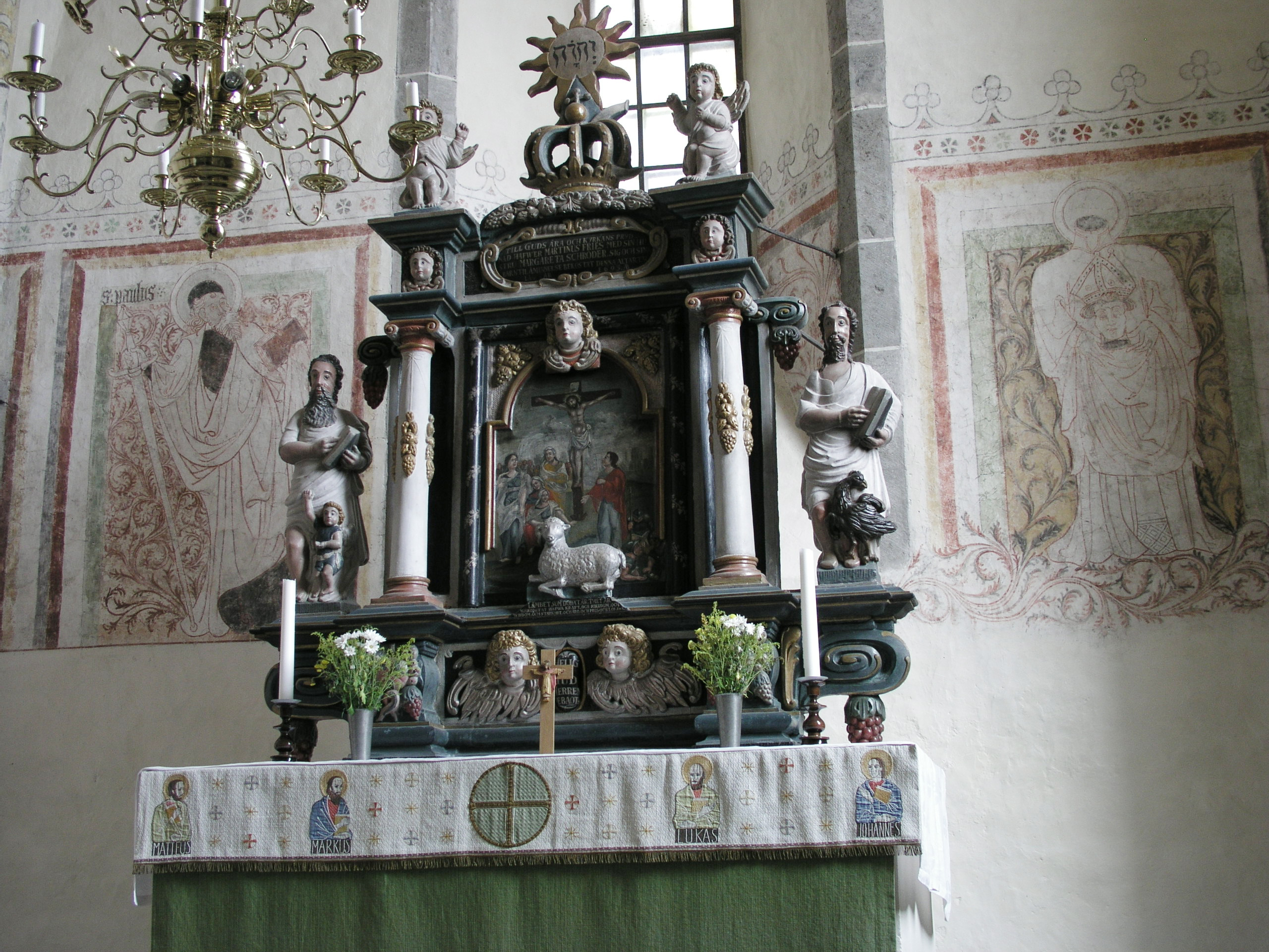 Othem kyrka / Othem church, Gotland, Sweden